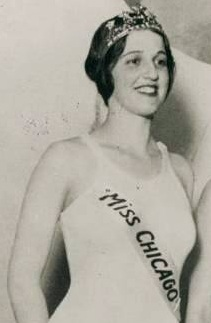 Ella van Huesen (Miss Universe 1928)